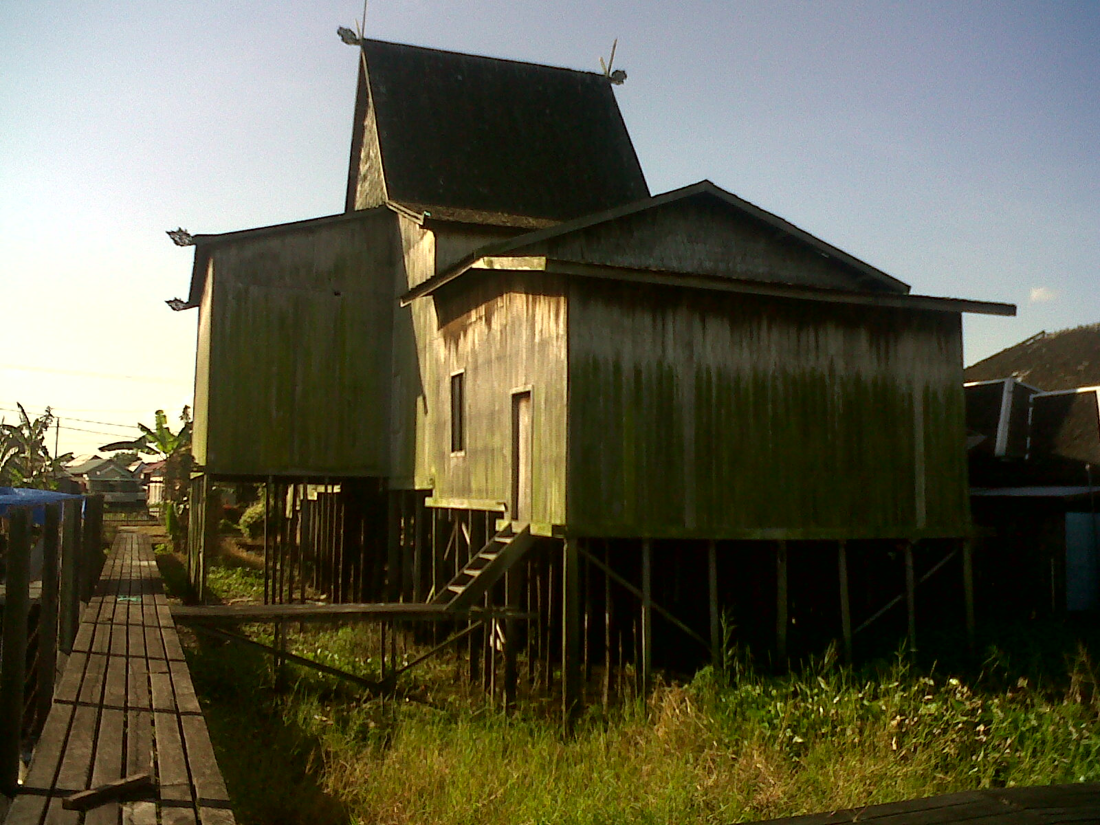 Bagian belakang Rumah Bubungan Tinggi Desa Habirau, Kalimantan Selatan